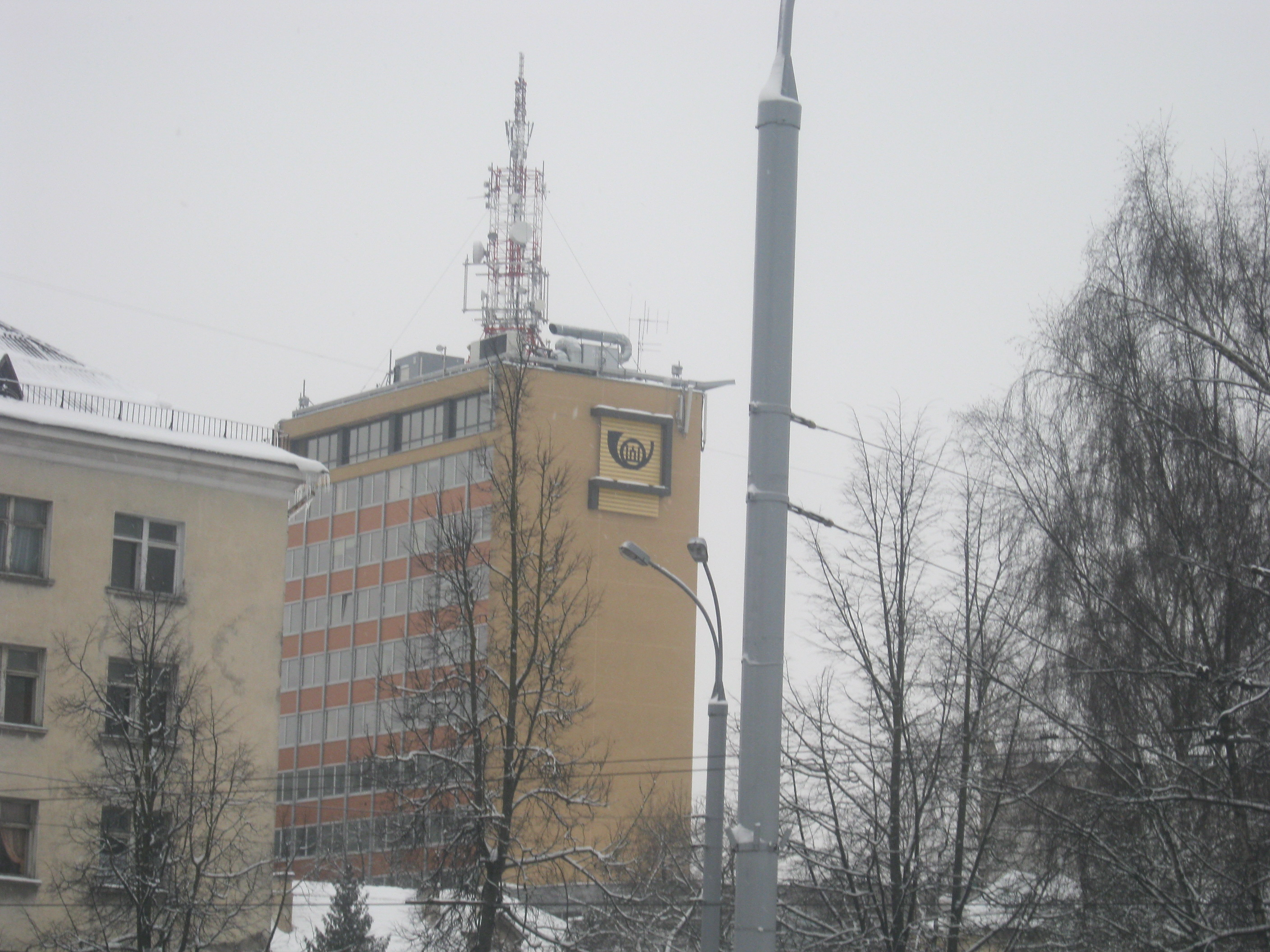 Lietuvos paštas